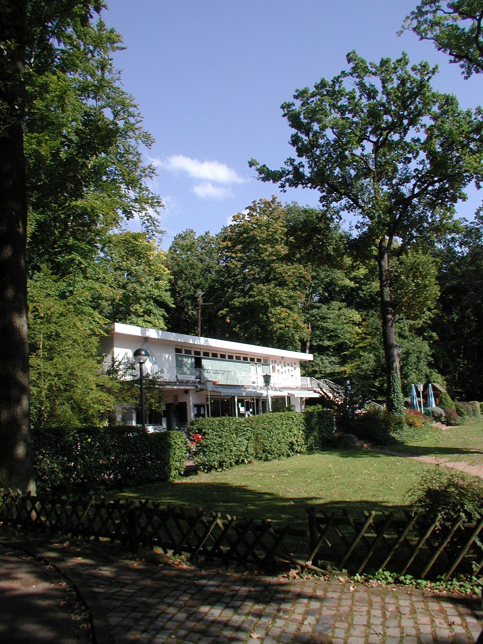 Stadtwald Köln-Lindenthal, Neubau des Klubhauses für den KTHC Stadion Rot-Weiss